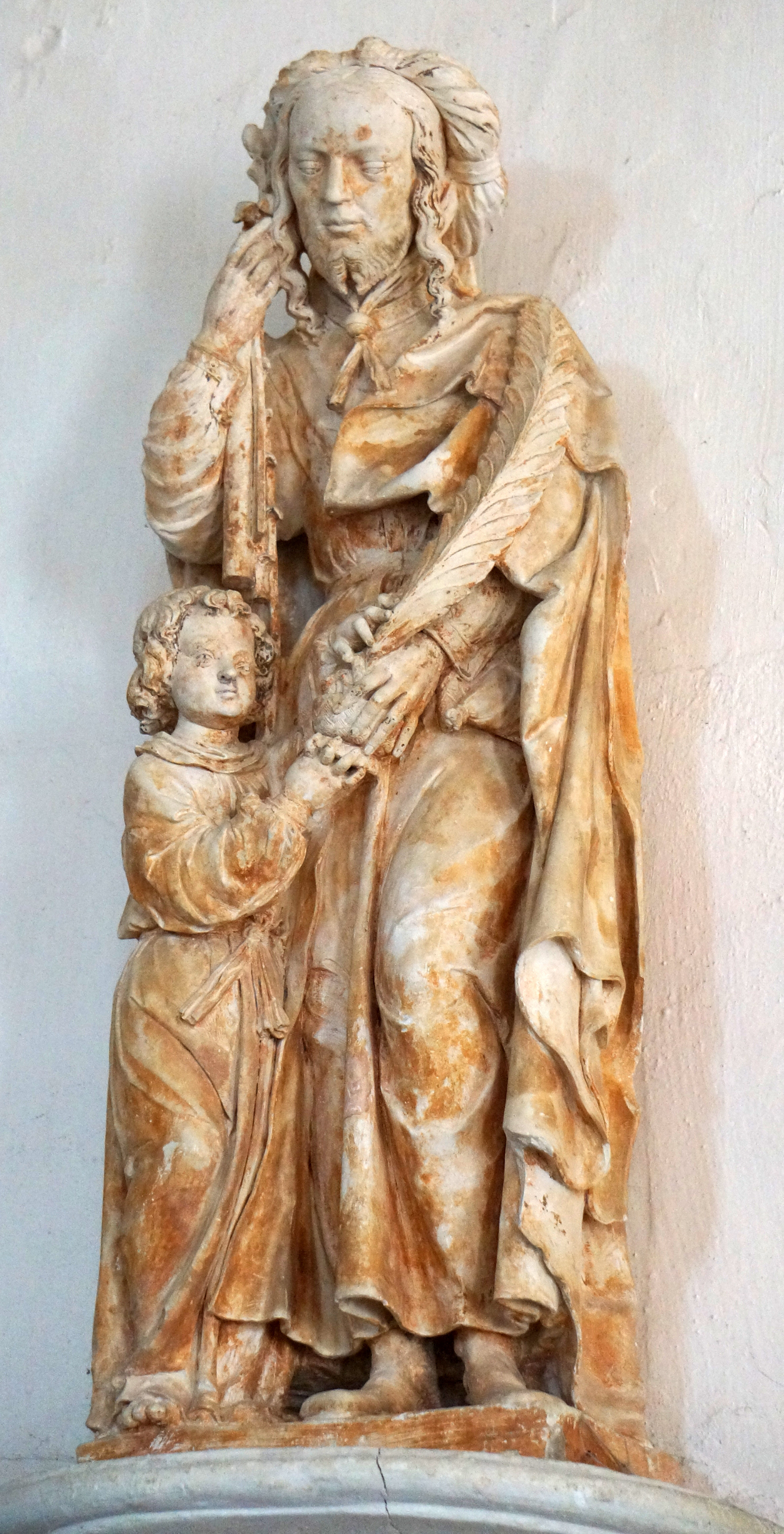 Statue de Joseph et Jésus dans l'église Saint-Pierre de l'Isle-Aumont. Une aumônière est accrochée à sa ceinture.